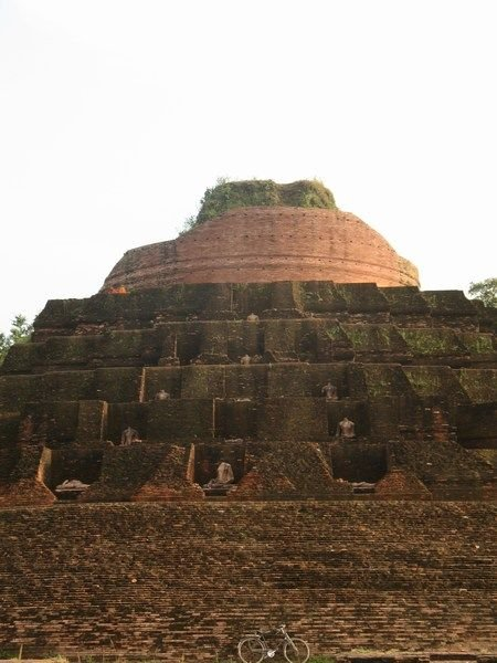 केसरिया, चंपारण, बिहार, भारत